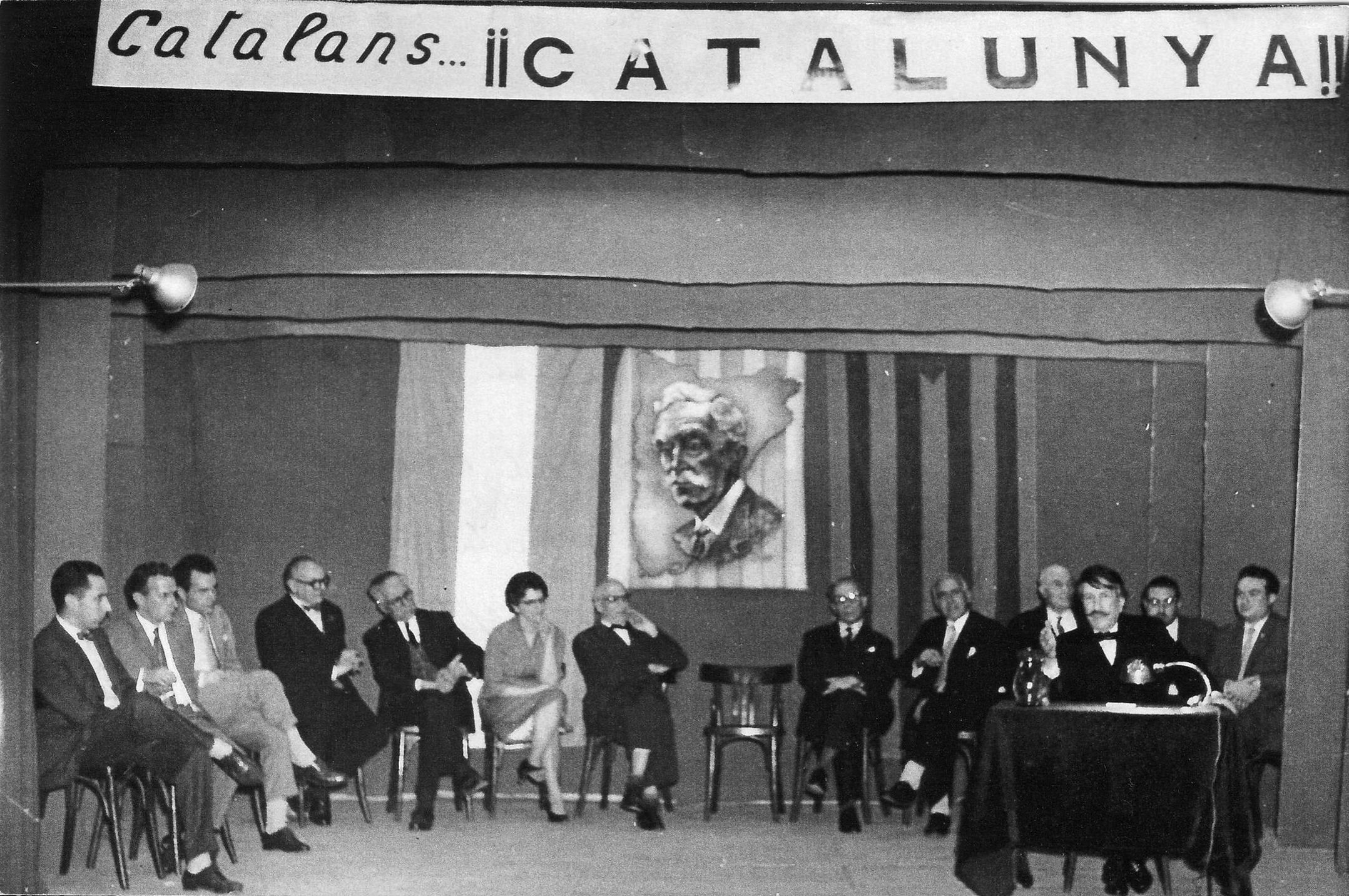 Homenaje del Grup Juventut Catalana a Francesc Macià, líder de la República Catalana, defendido en Buenos Aires por el doctor Alfredo L. Palacios. Buenos Aires 1959.